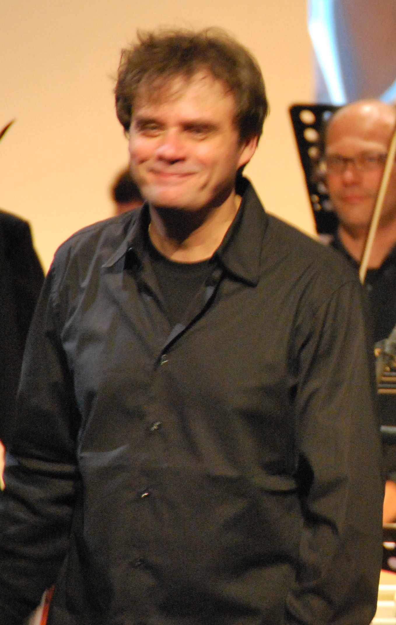 Ottavio Dantone podczas koncertu w Teatrze im. Słowackiego w Krakowie w ramach festiwalu Opera Rara, 18.12.2009